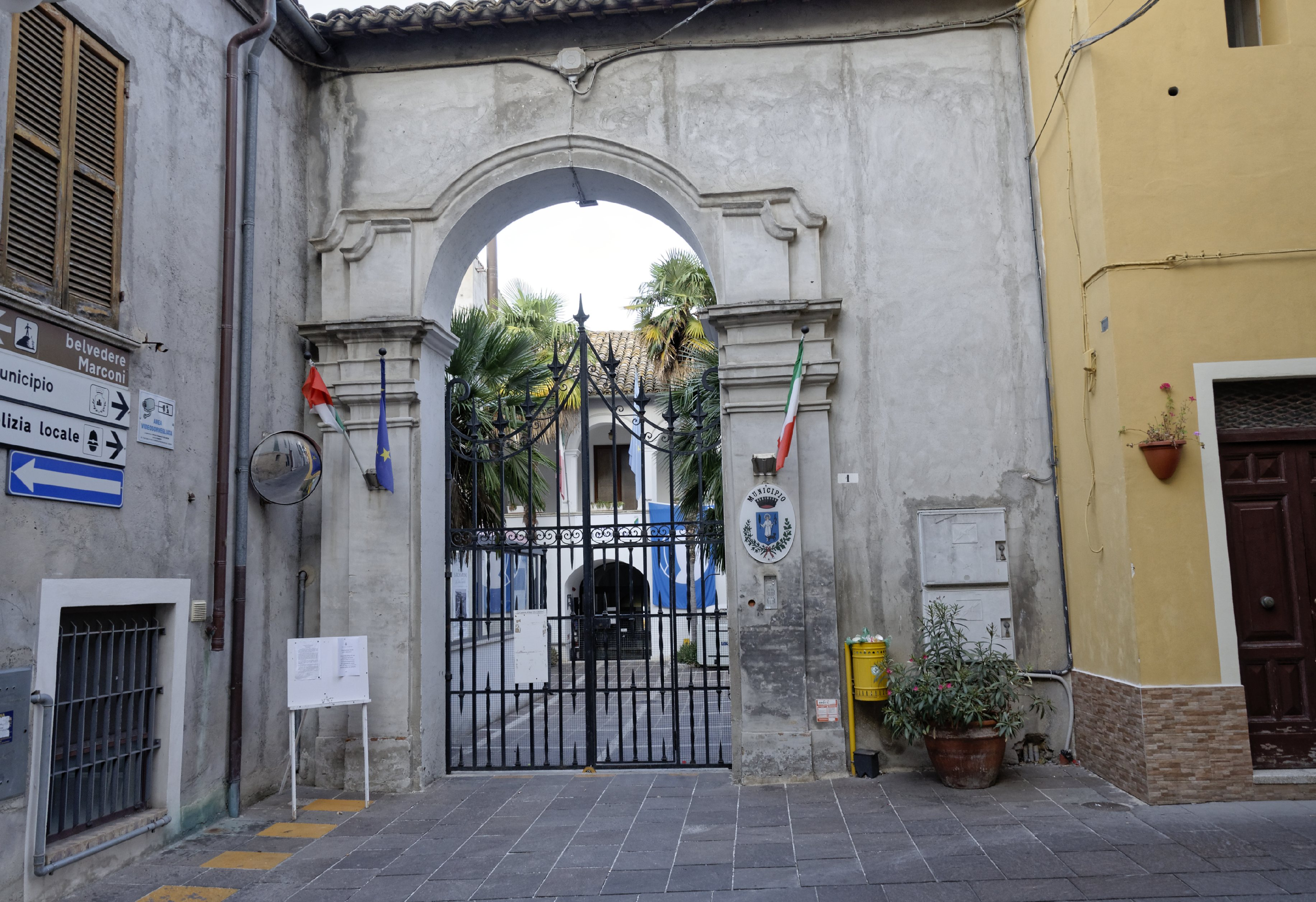 San Vito Chietino 2015 Dieses Foto entstand in Zusammenarbeit mit Stadtbesichtigungen.de Die Seiten Stadtbesichtigungen.de, der dazugehörige Reise Blog sowie die Facebookseite: Stadtbesichtigungen Rom dürfen dieses Bild für Ihre Veröffentlichungen ohne den Hinweis auf Wikipedia, Commons bzw der Lizenz verwenden. Die Verantwortlichen habe von mir (Ra Boe) die Originaldaten zur freien Verfügung übermittelt bekommen.